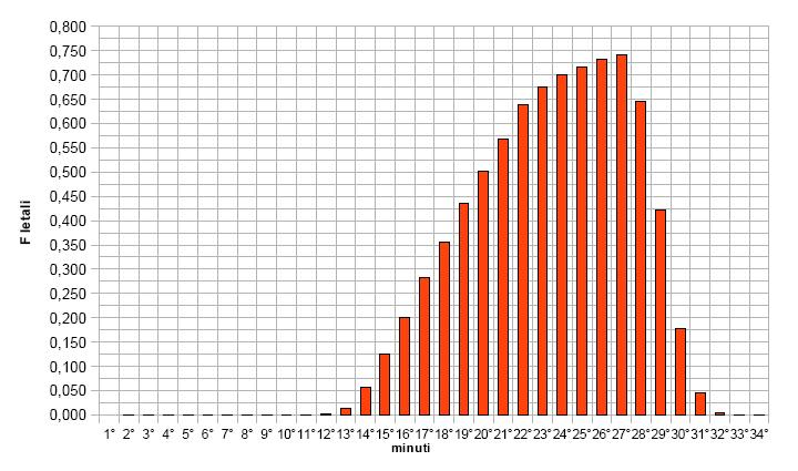 Elaborazione grafica del calcolo di F dai singoli contributi termici per ogni temperatura media in un ipotetici ciclo di sterilizzazione